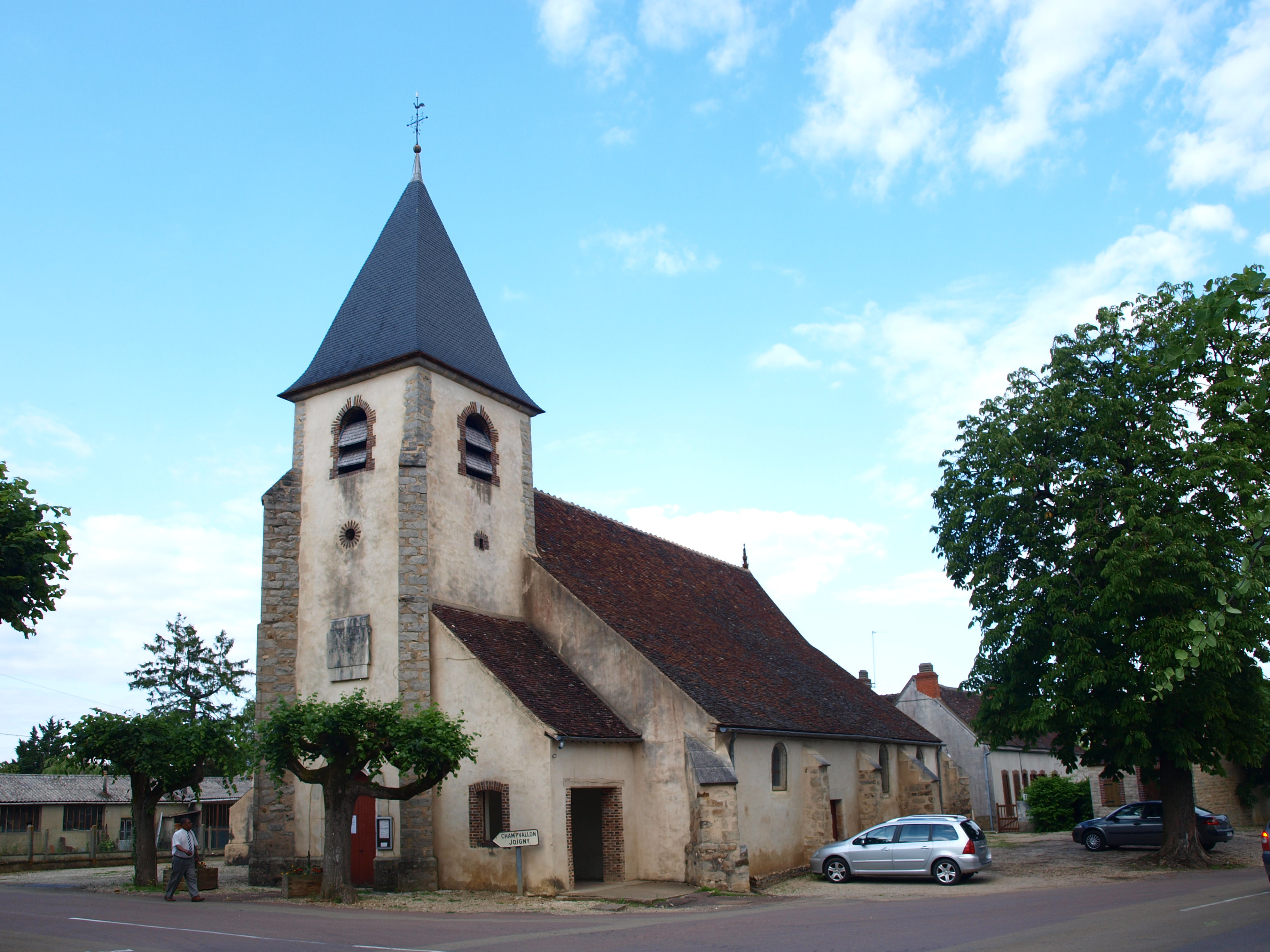 Volgrè (Yonne, France) ; l'église